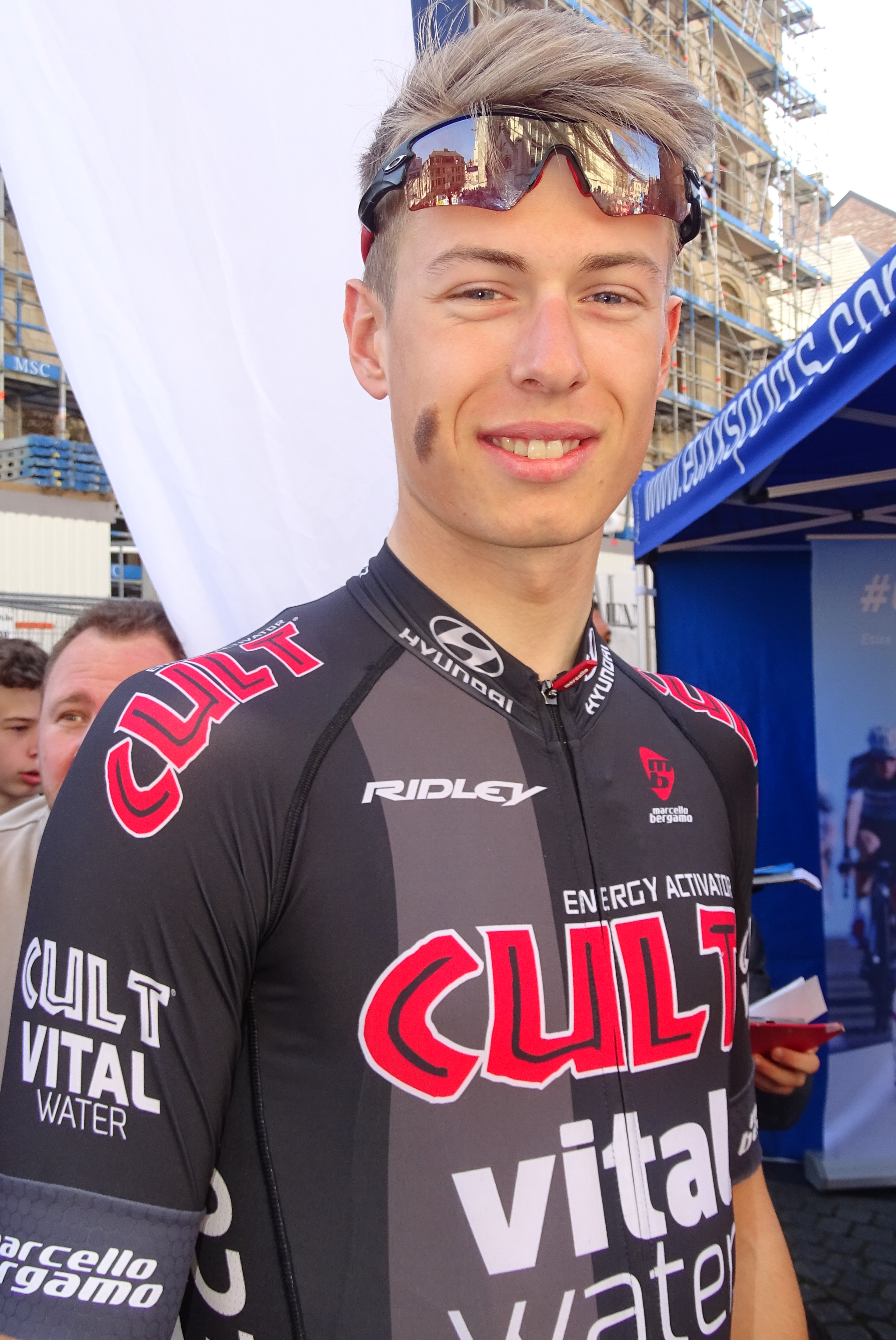 Reportage réalisé le mercredi 15 avril à l'occasion du départ de la Flèche brabançonne 2015 à Louvain, Belgique.